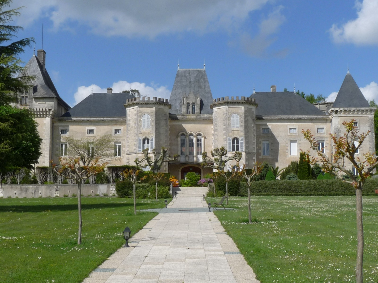 La Meynardie, château et ancien bâtiment du centre hospitalier, Saint-Privat-des-Prés, Dordogne, France